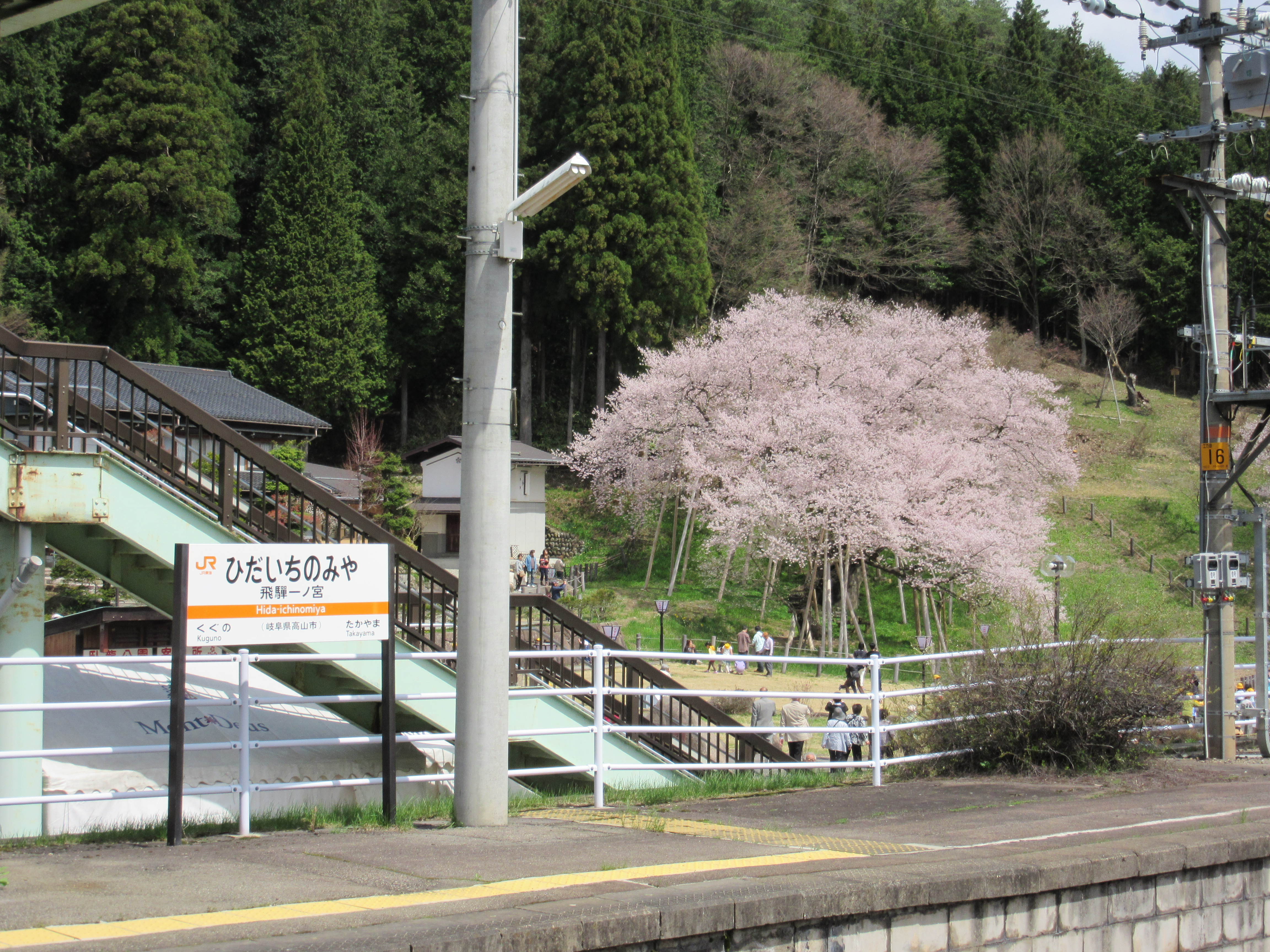 飛騨一ノ宮駅ホーム。奥に見える桜は臥龍桜。